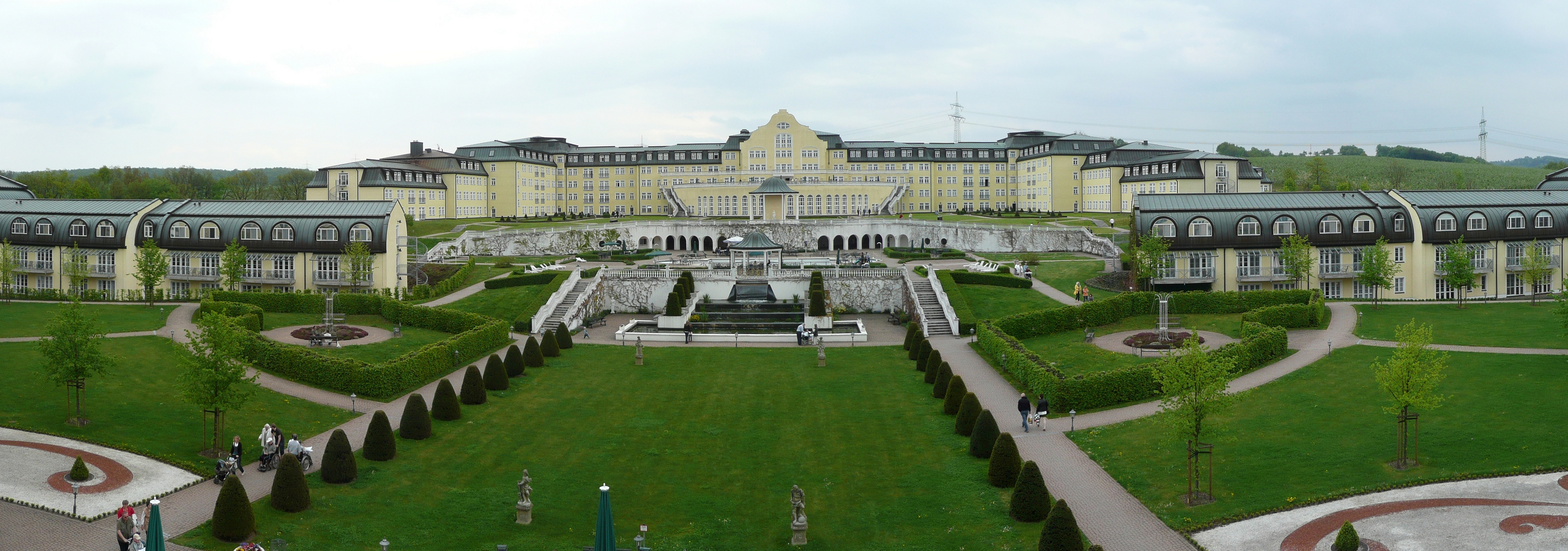 Das Bild zeigt die Bavaria-Klinik in Kreischa.